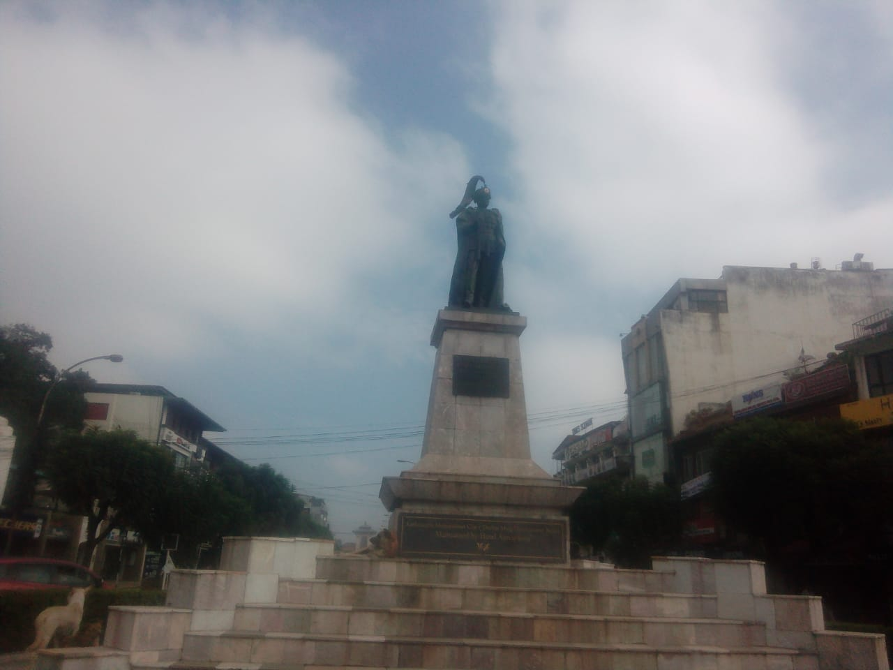 नेपाली: महेन्द्र शालिक